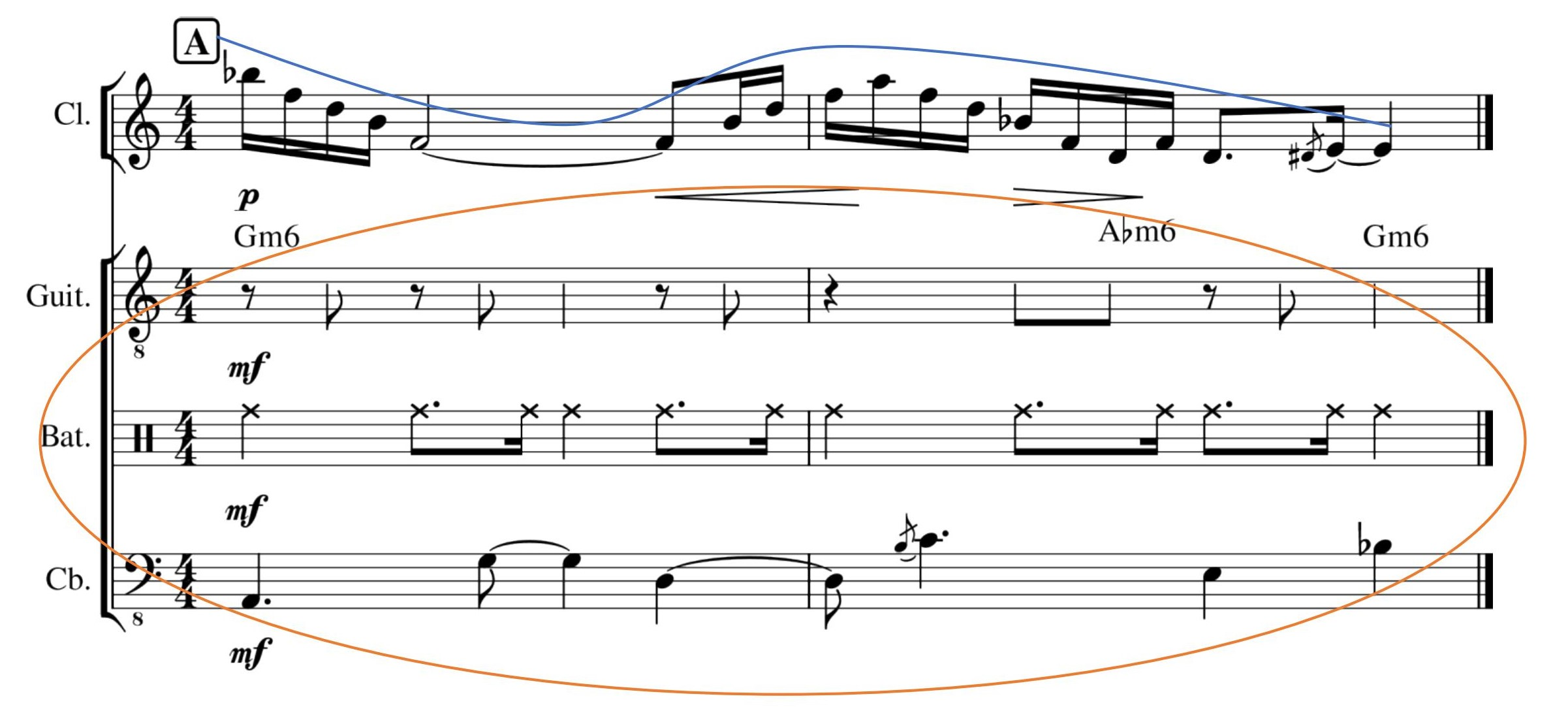 Extrait de la pièce XI d'Anna Livia Plurabelle d'André Hodeir